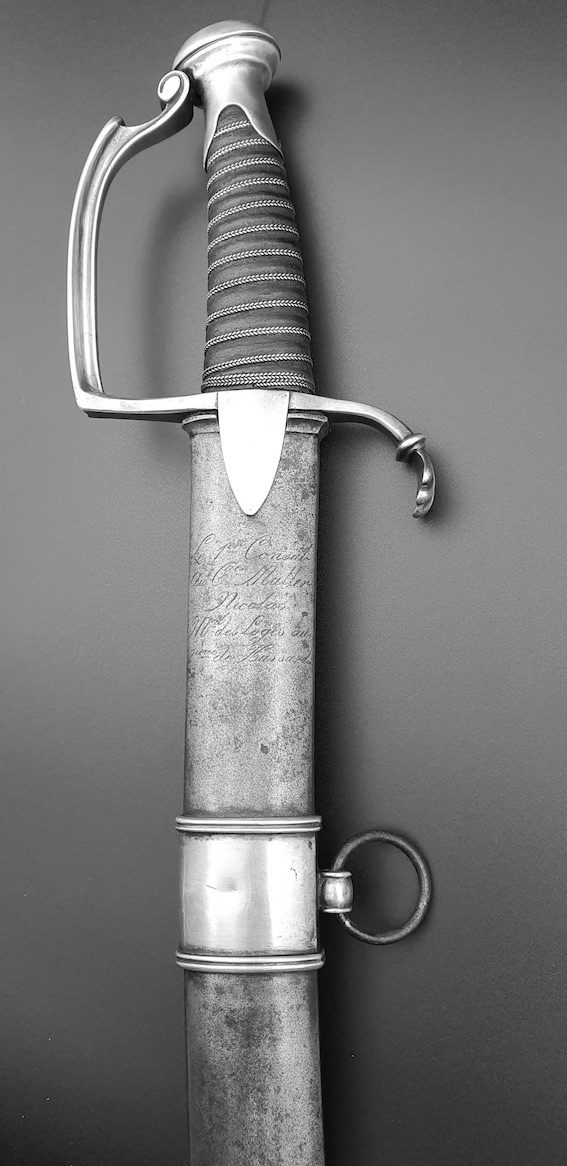 Sabre de la collection , sabre d'Honneur remis par Bonaparte, AN XI de la République française